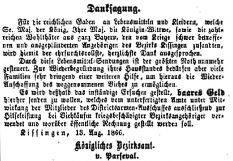 Anzeige vom 13. August 1866 des Bad Kissinger Bezirksamtmannes Joseph von Parseval